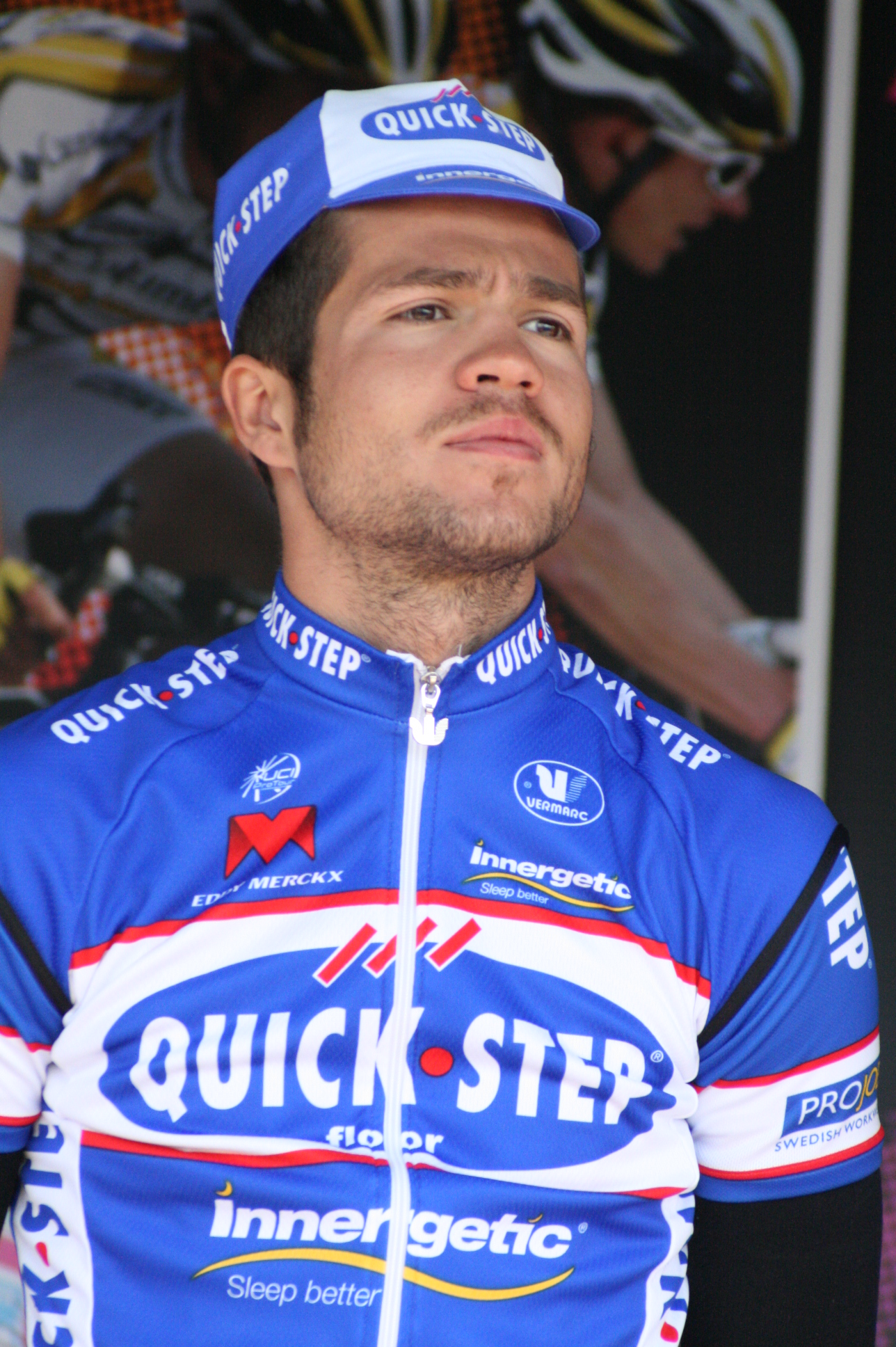 Andreas Stauff, lors de la présentation des équipes des 4 jours de Dunkerque 2010